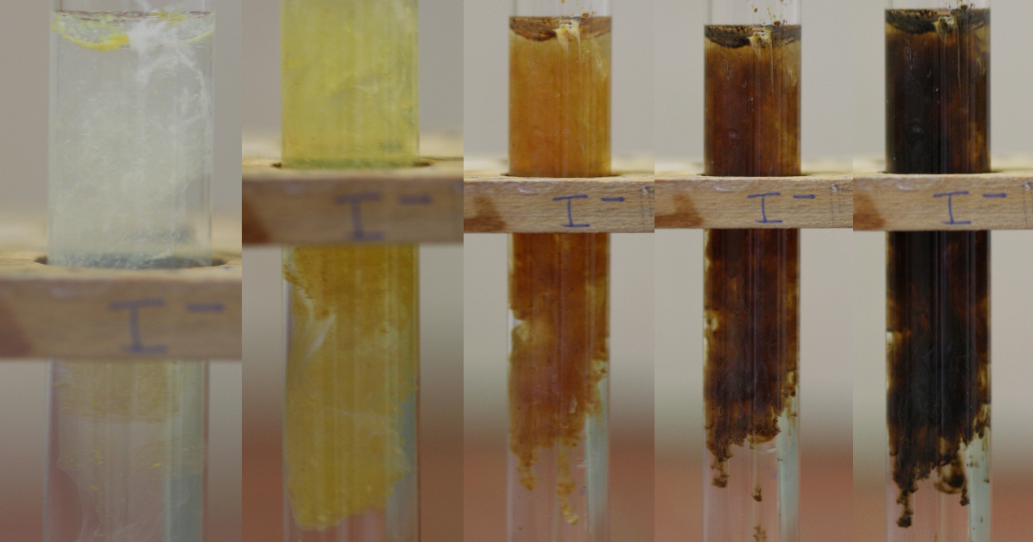 Die Sonnenuntergangsreaktion ist ein Nachweis auf Thiosulfat mit Silber(I)-Ionen. Dabei wird primär weißgelbes Silberthiosulfat gefällt, welches langsam zu schwarzem Silber(I)sulfid und Schwefelsäure disproportioniert. Daher zeigen sich alle Farbabstufungen von weißgelb über rotbraun nach schwarz.